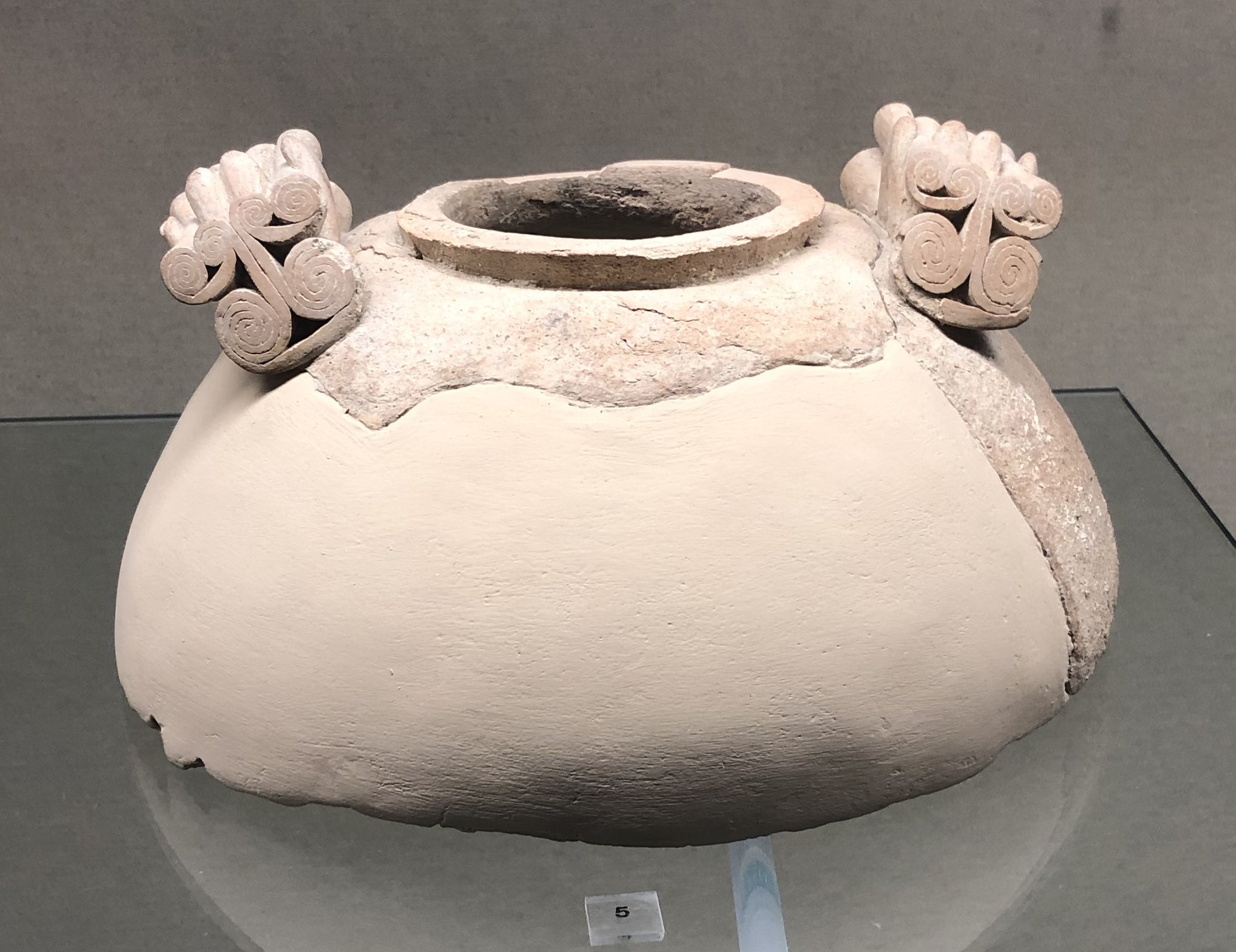 Da Stazione di Marco (Paternò) Tardo Neolitico, Stile di Serra d'Alto. fine V millennio a.C. ca